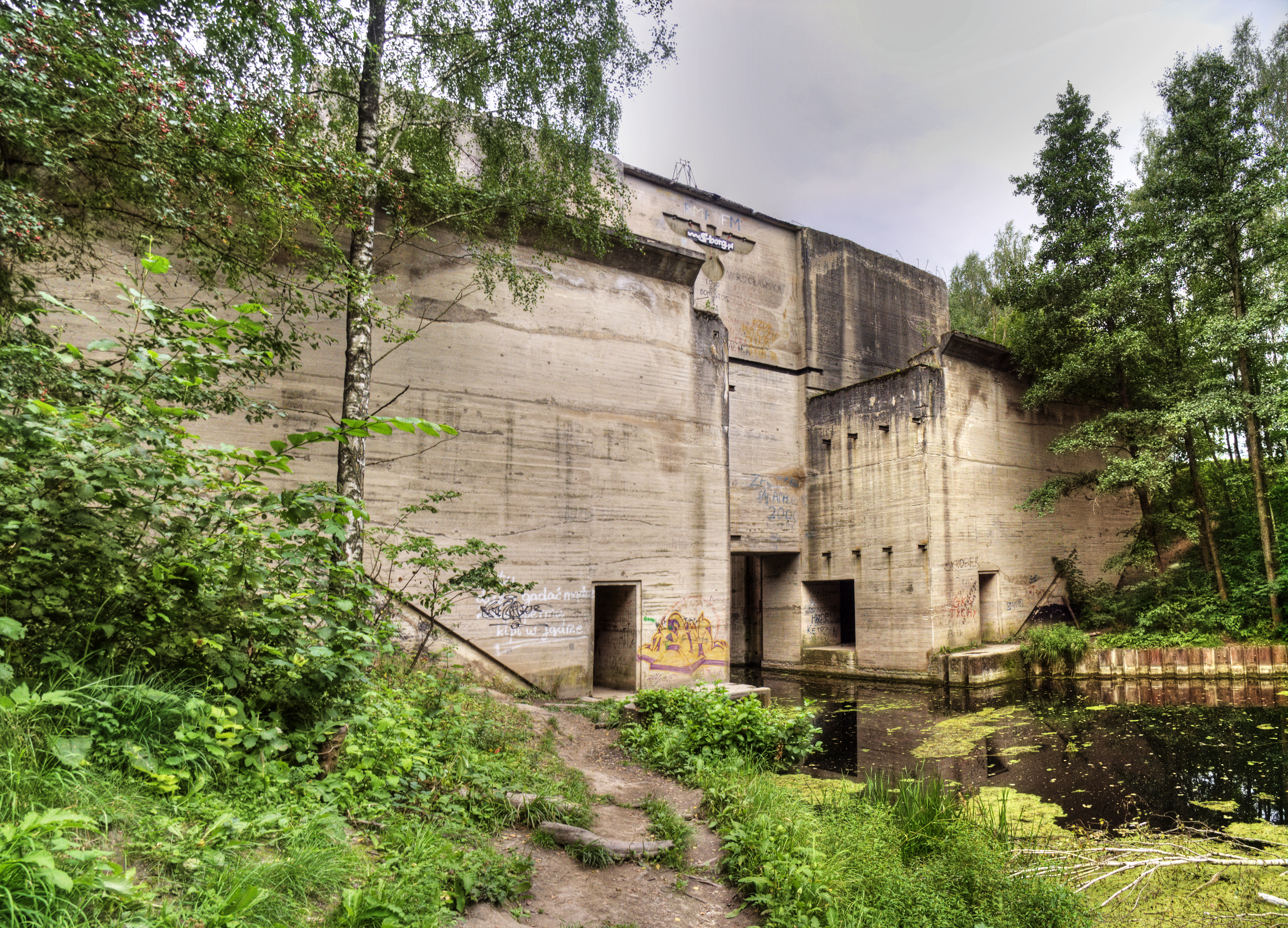 Nieukończona śluza na Kanale Mazurskim w Leśniewie Górnym